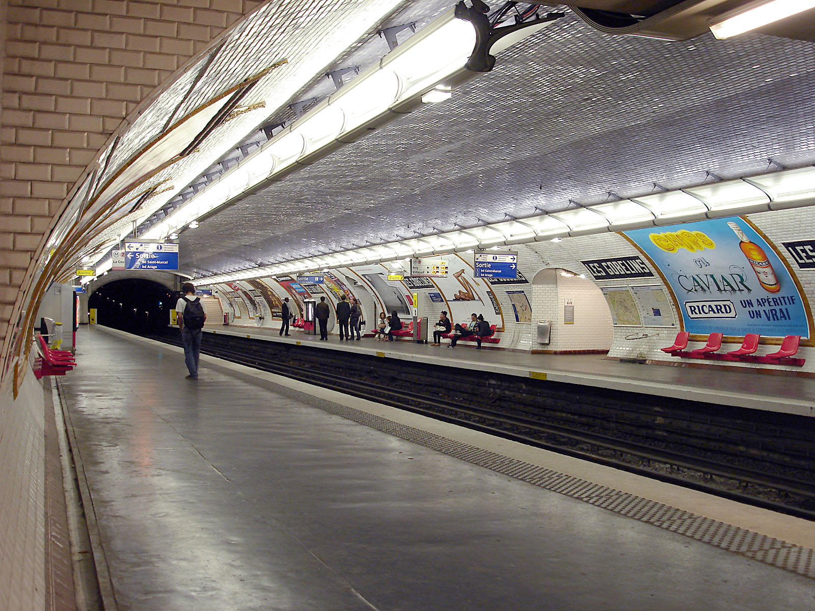 La station Les Gobelins de la ligne 7 du métro de Paris, France.